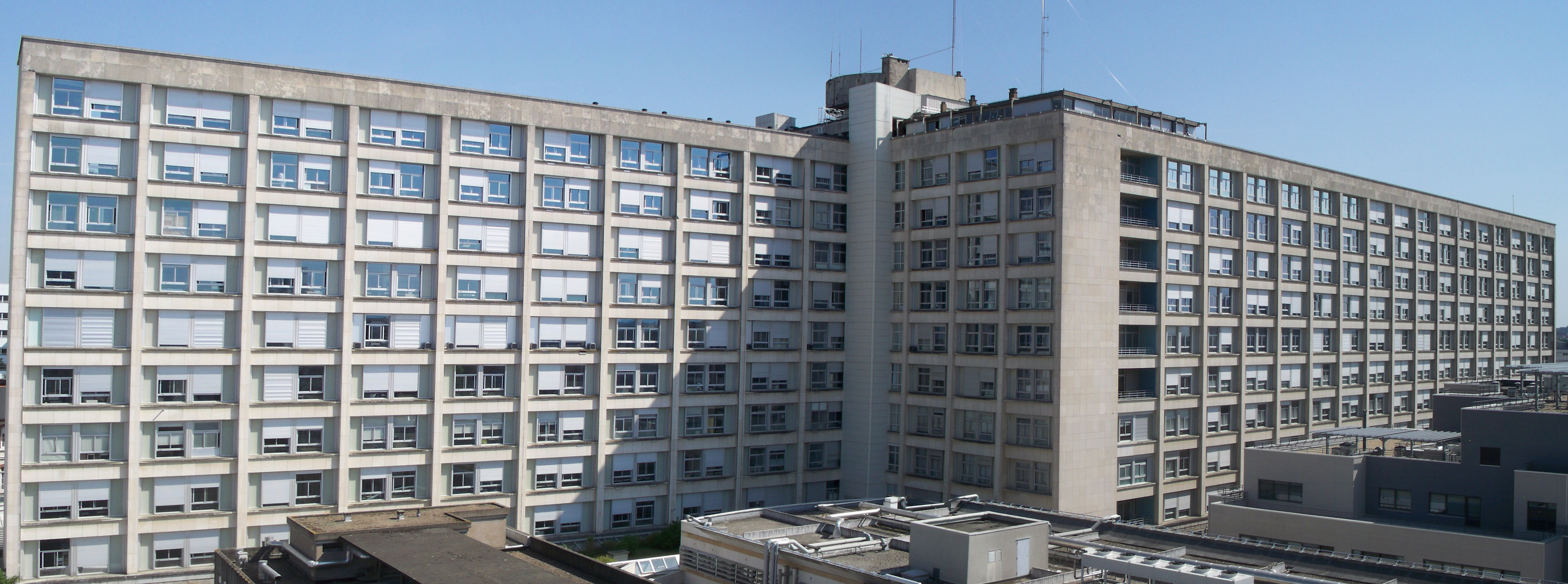 Bâtiment principal de l'Hopital Pontchaillou, Rennes.